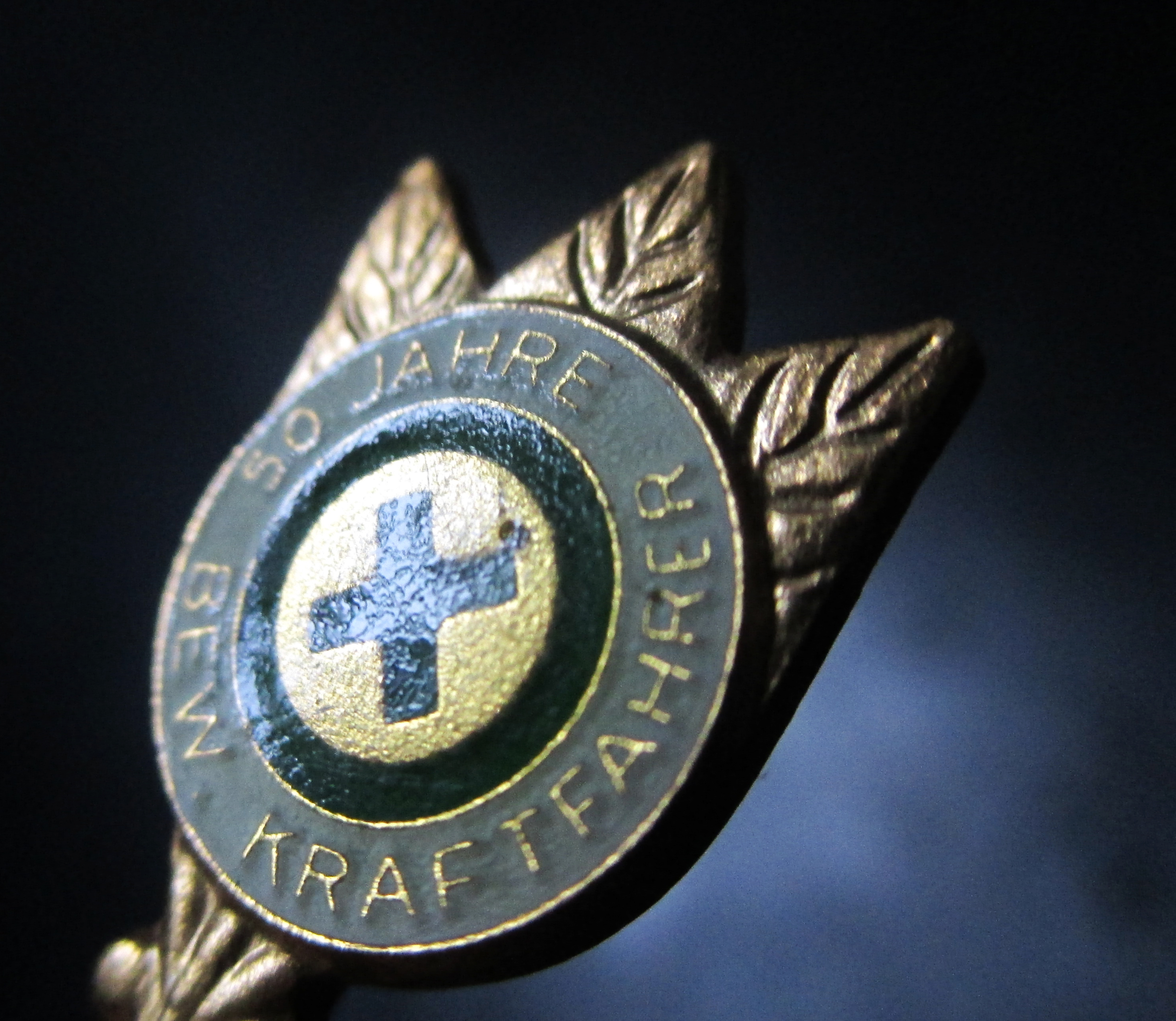 Auszeichnung - 50 Jahre Kraftfahrer